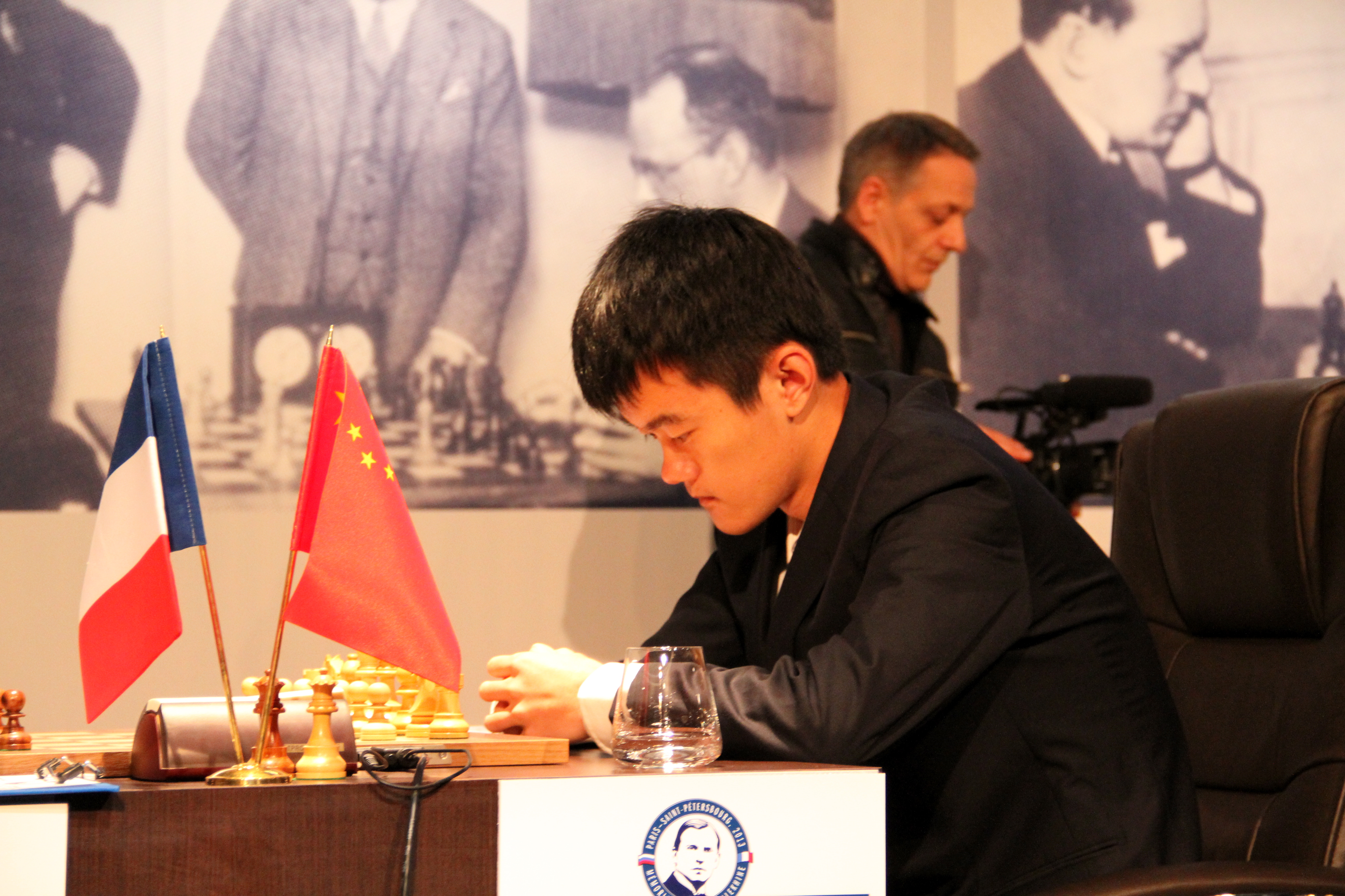 Ding Liren au Mémorial Alekhine 2013 (Paris)